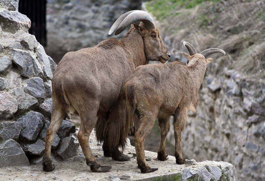 Горные бараны